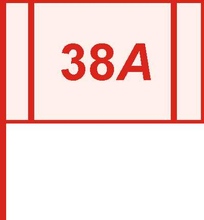 Іконка - прапор 38-ї загальновійськової армії ЗС СРСР